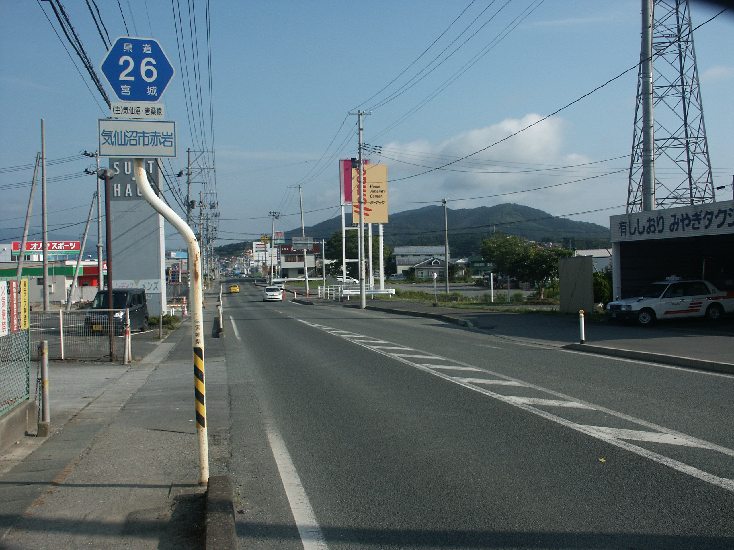 宮城県道26号線気仙沼市赤岩付近